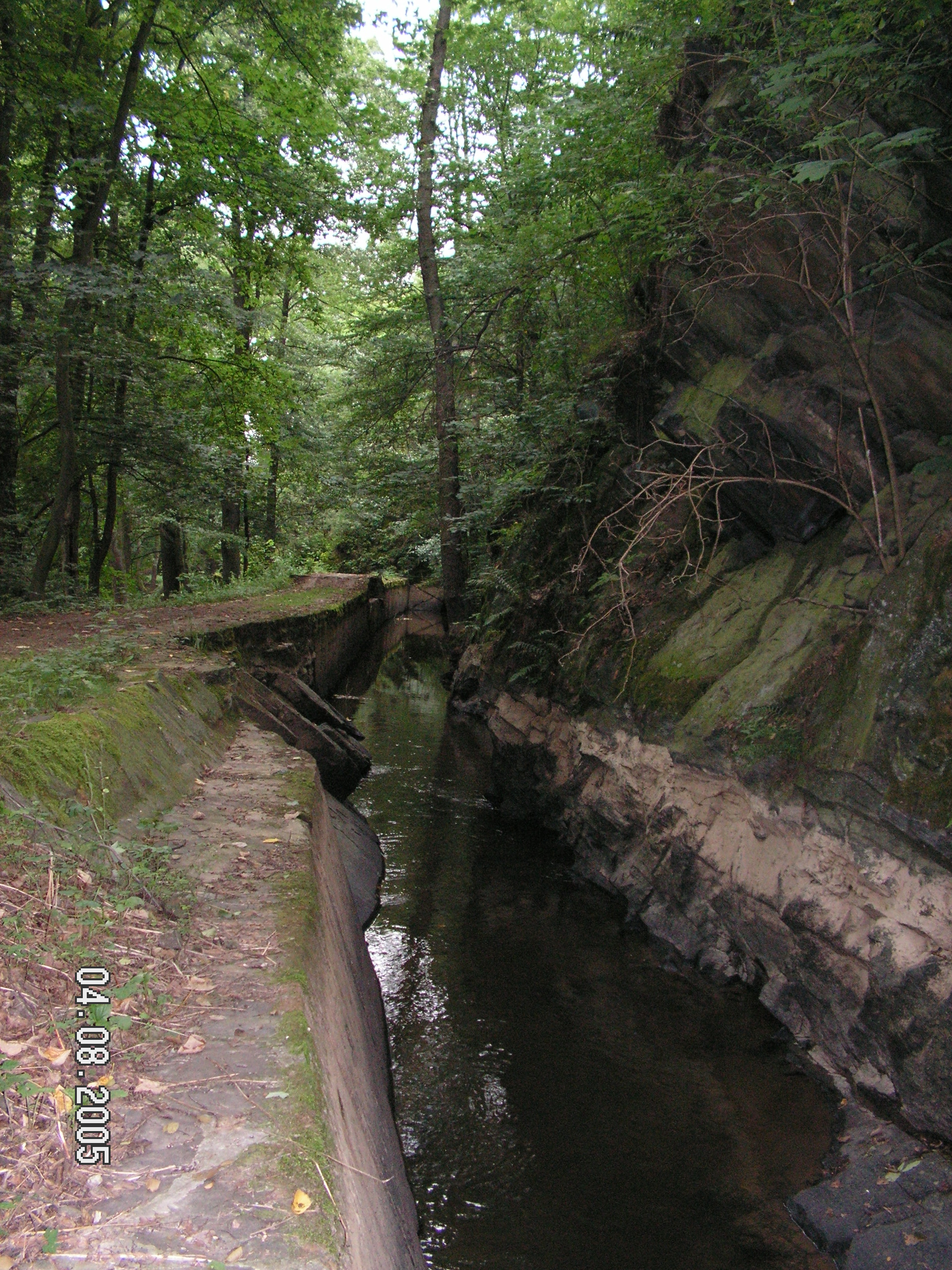 Vodní náhon Korečnického mlýna u Ronova nad Doubravou. Uprostřed snímku je částečně vidět otvor skalního tunelu, kterým je voda dále vedena.